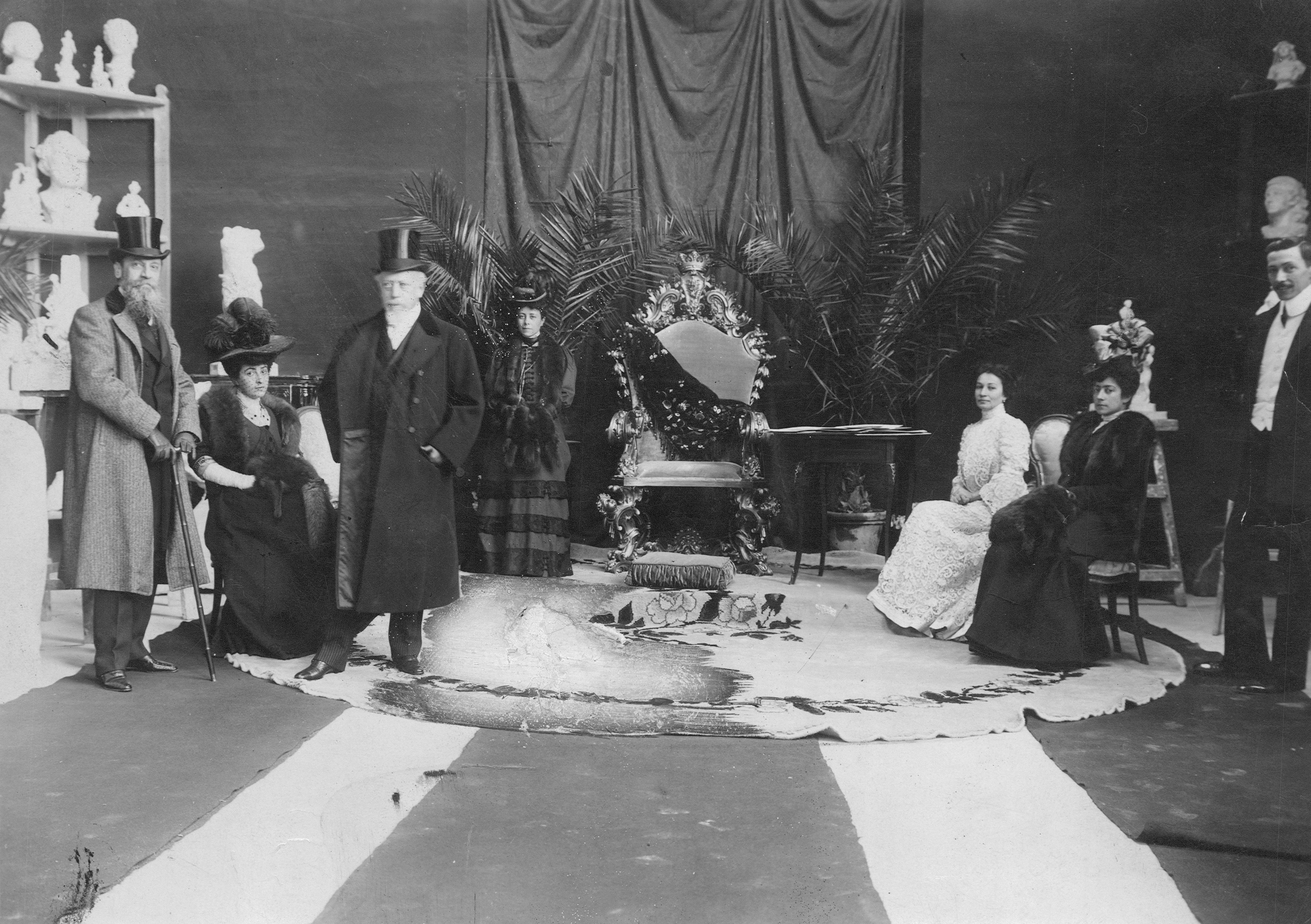 Lola Mora y Julio Argentino Roca luego de la visita de la reina Margarita, en Roma 1906. Inventario 52630